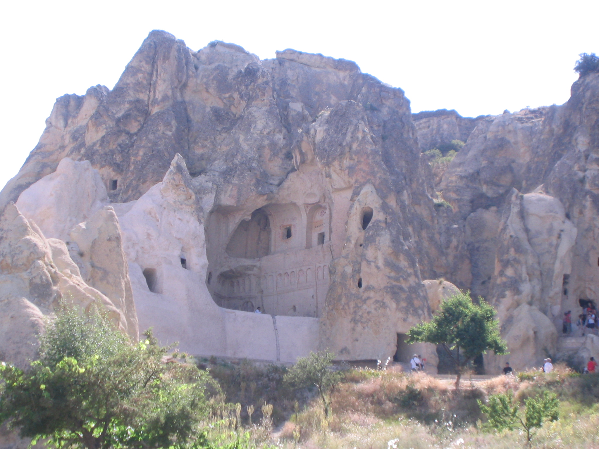 Museo al Aire Libre de Göreme, Cappdocia (Turquía).